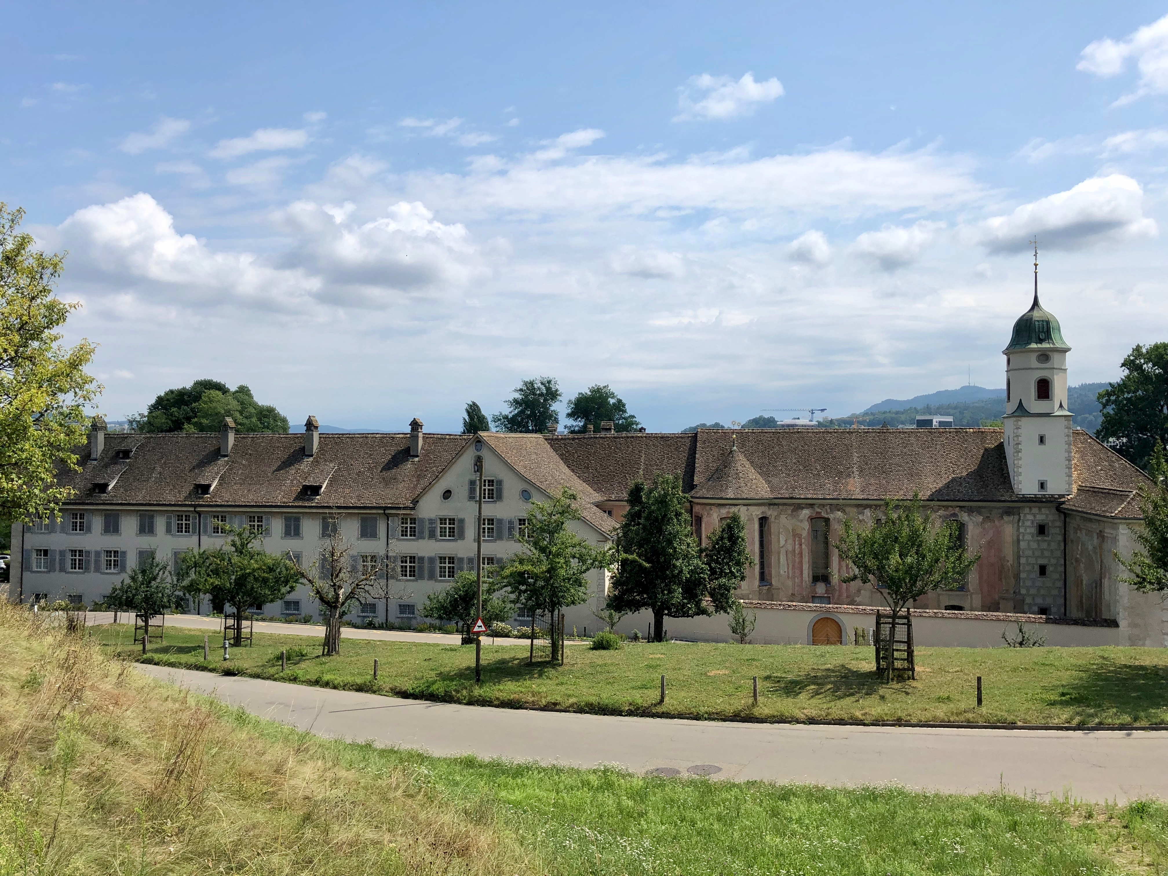 de: Kloster Fahr, August 2019